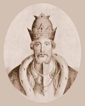 książę moskiewski (1303- 1325)